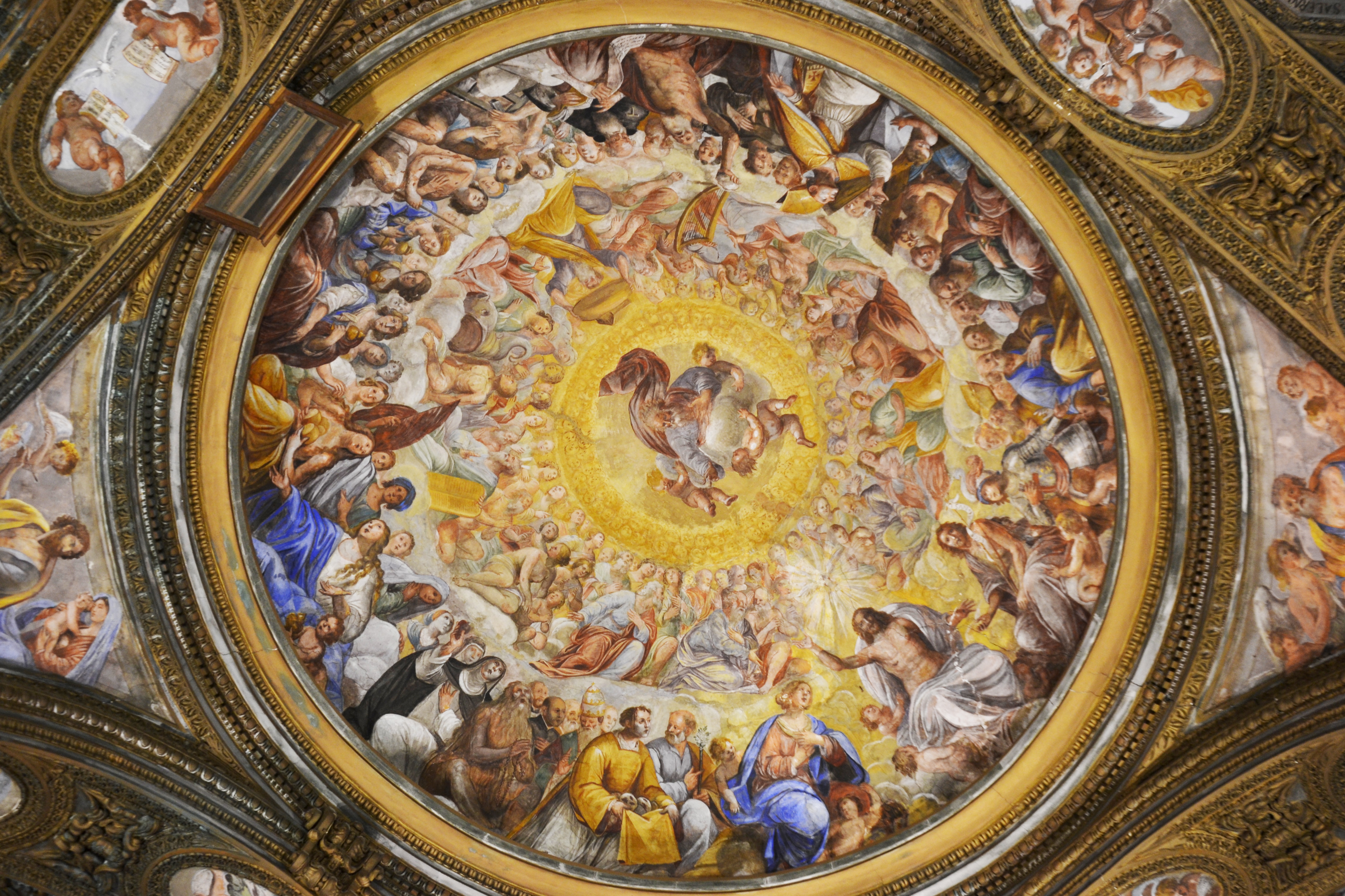 Dettaglio della cupola di San Giorgio in Salerno